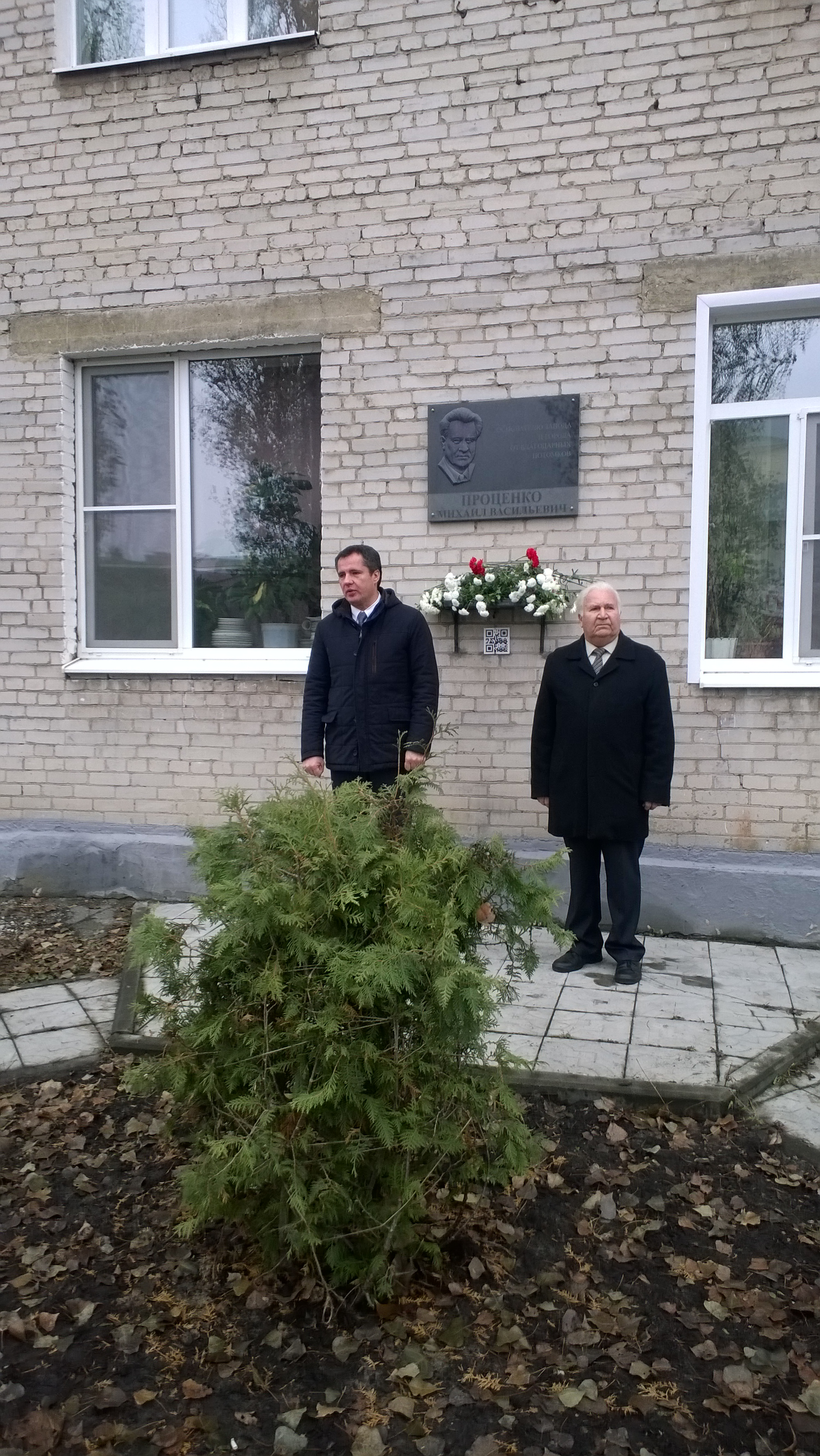 Вахта памяти у памятной доски М.В. Проценко